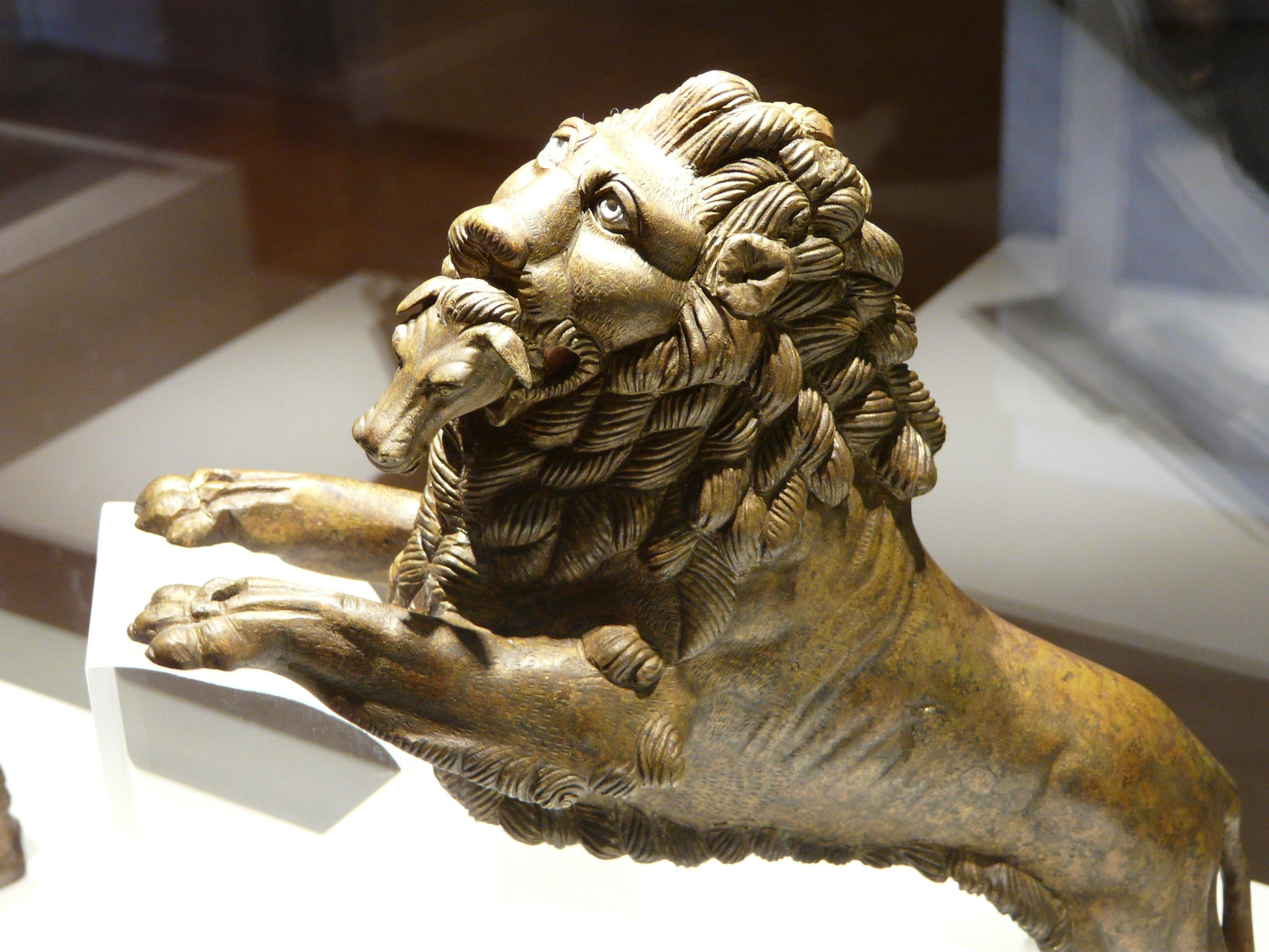 Lion en bronze et aux yeux incrustés d'argent découvert dans un puits exposé au musée Emile Chénon